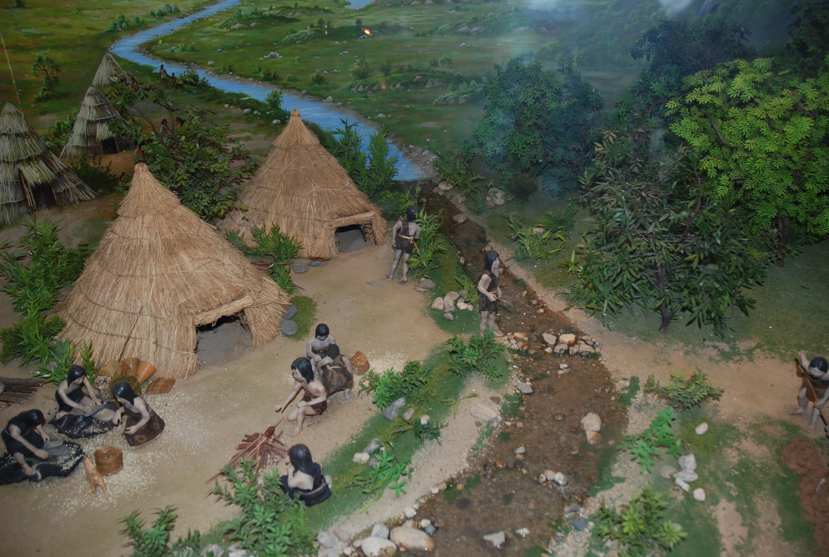 선사시대의 생활상 모형도(암사동 선사박물관)